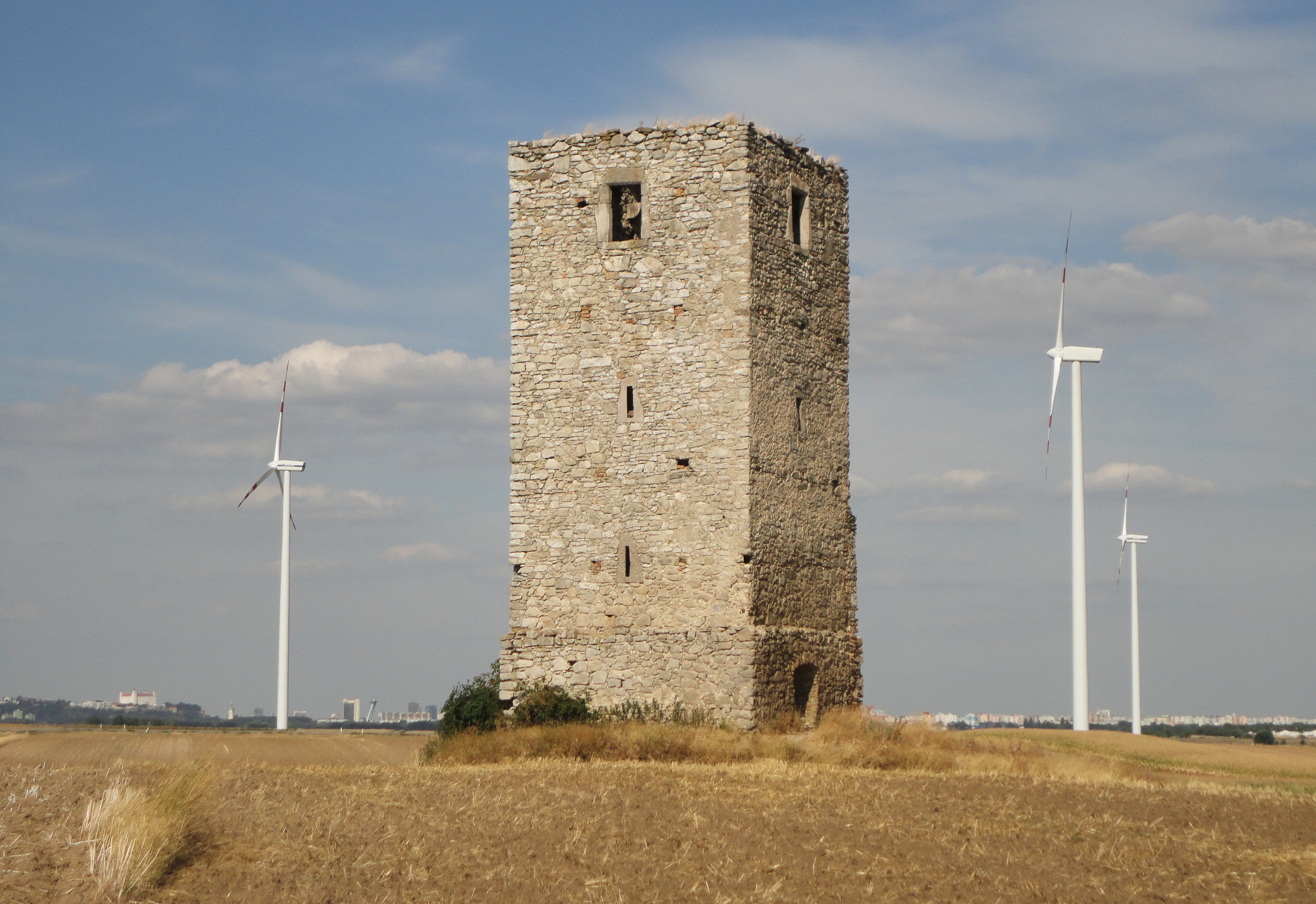 Heidenturm bzw. Öder Turm und im links im Hintergrund die Burg von Bratislava